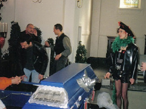 Napoleon hat seine Beisetzung in der Kapelle des Alten St.-Matthäus-Kirchhofs schon 1995 fürs Fernsehen inszeniert. Foto habe ich gemacht - vorne auch Ovo Maltine.